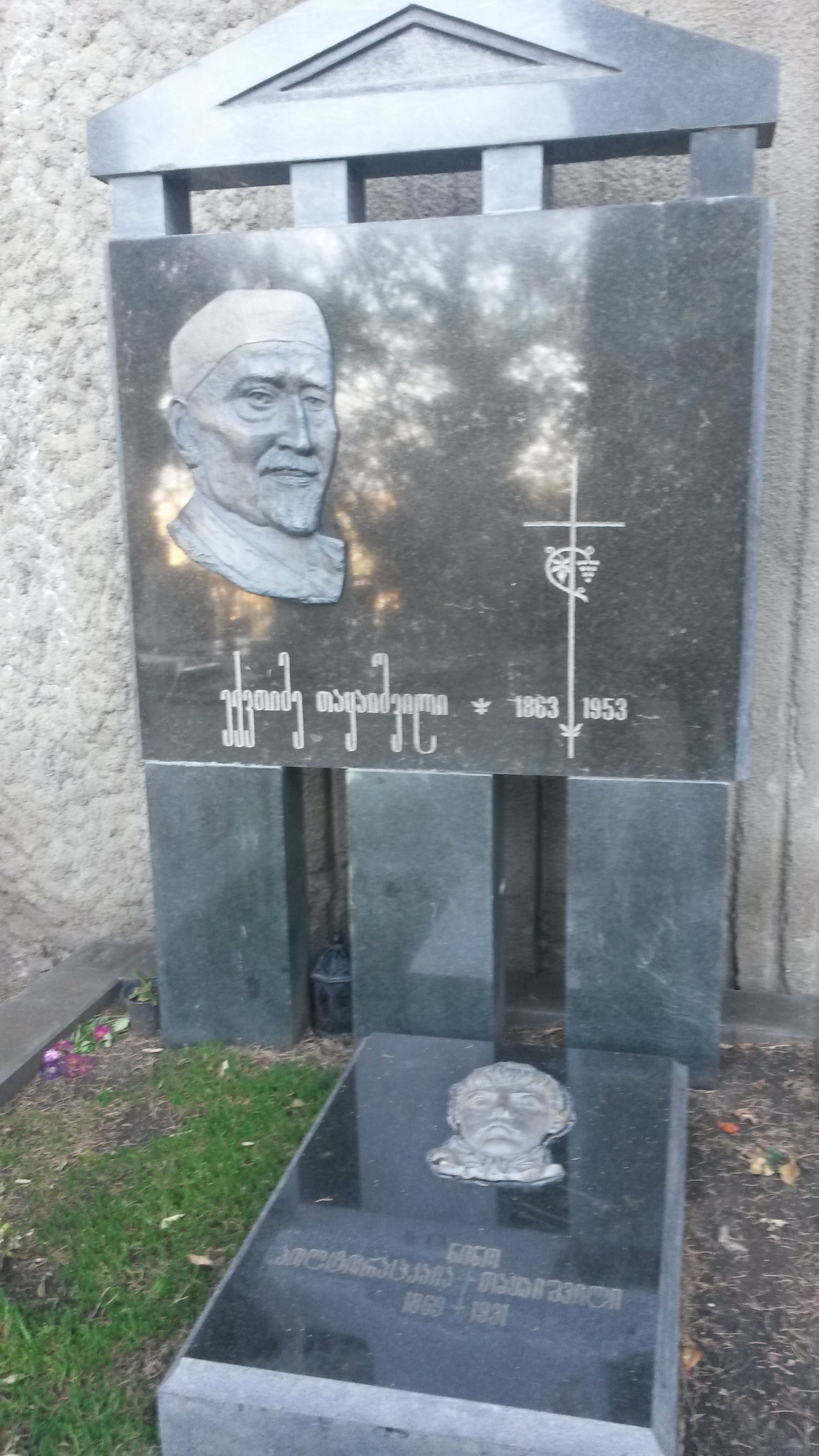 მთაწმინდის პანთეონი